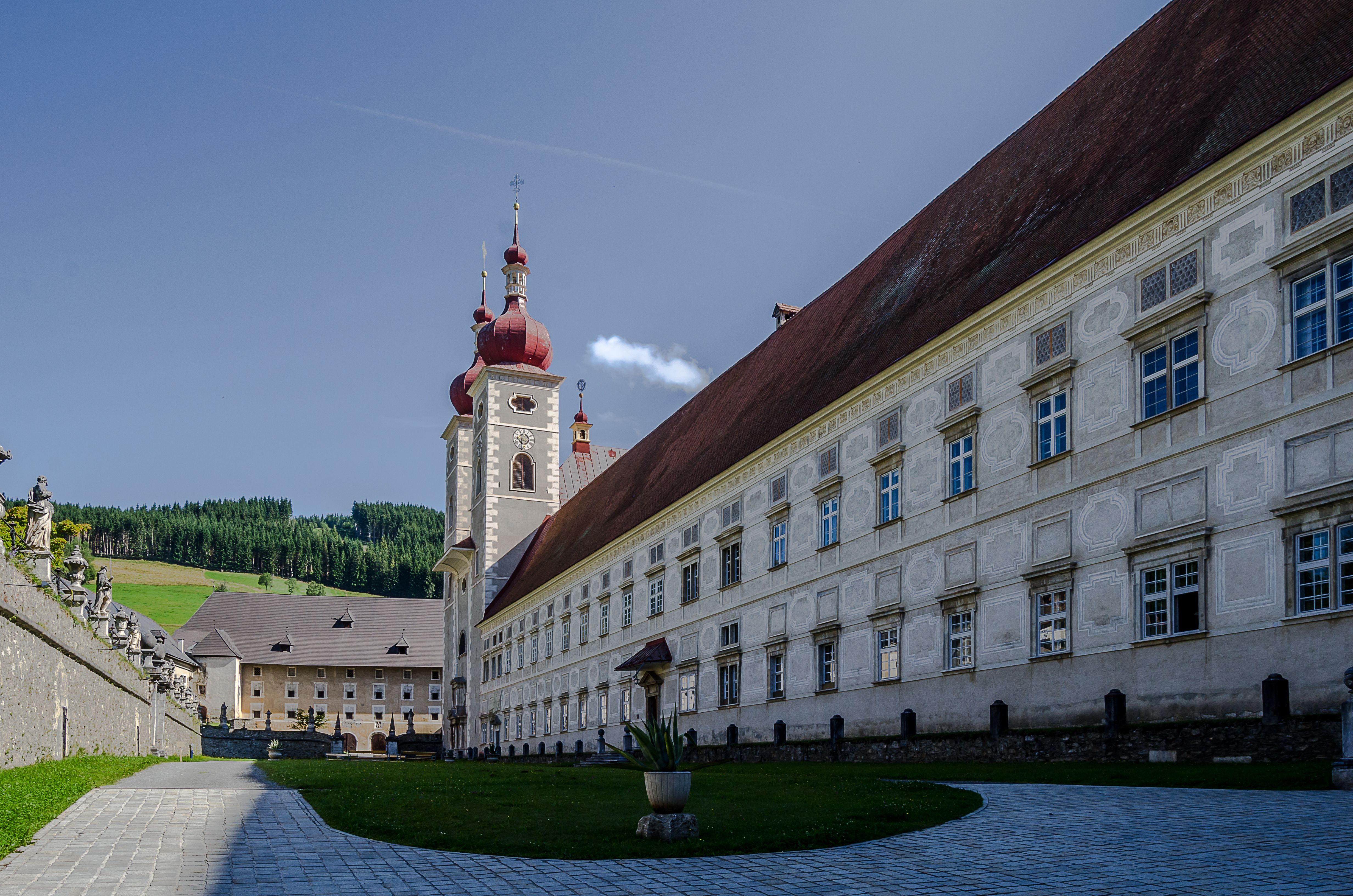 Gesamtanlage Benediktinerstift St. Lambrecht